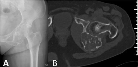 Immagini RX e TC di un condrosarcoma della pelvi. All'esame radiografico (A) si evidenzia una minima reazione periostale. Alla TC (B) si osserva invece una lesione osteolitica a margini mal definiti e con calcificazioni nel suo contesto. Modificato da Liu et Al. 2017 Dedifferentiated chondrosarcoma: Radiological features, prognostic factors and survival statistics in 23 patients PLOS One CC-BY 4.0 Licence